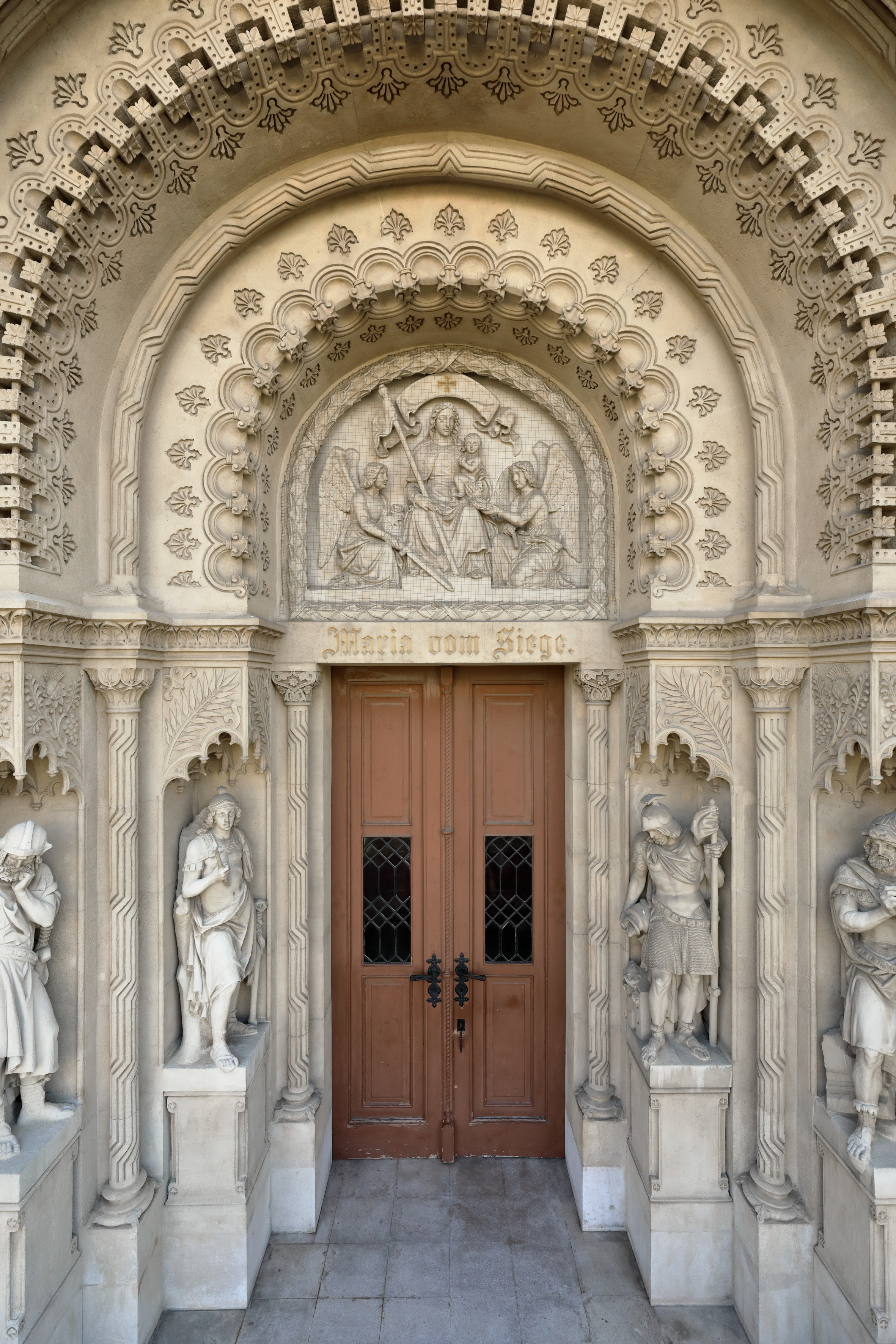 Hauptportal der Arsenalkirche im 3. Wiener Gemeindebezirk Landstraße.In der Portallaibung befinden sich die Statuen von Gideon, Sebastian, Josua und Florian, die aus der Bildhauerwerkstatt Franz Högler stammen. Im Tympanon ist Maria mit der Siegesfahne dargestellt.